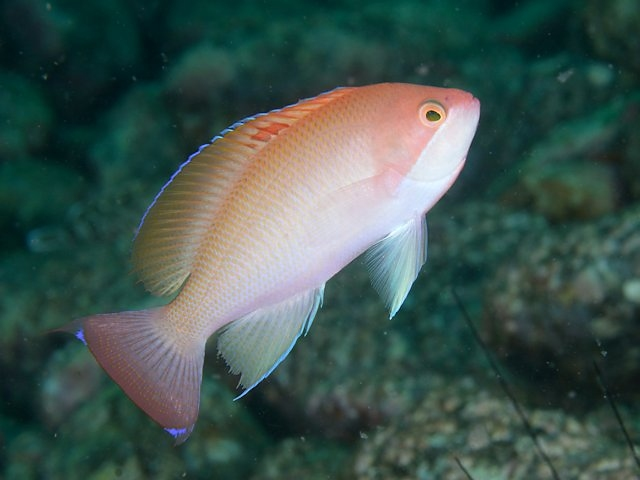 ケラマハナダイ♂ Pseudanthias hypselosoma